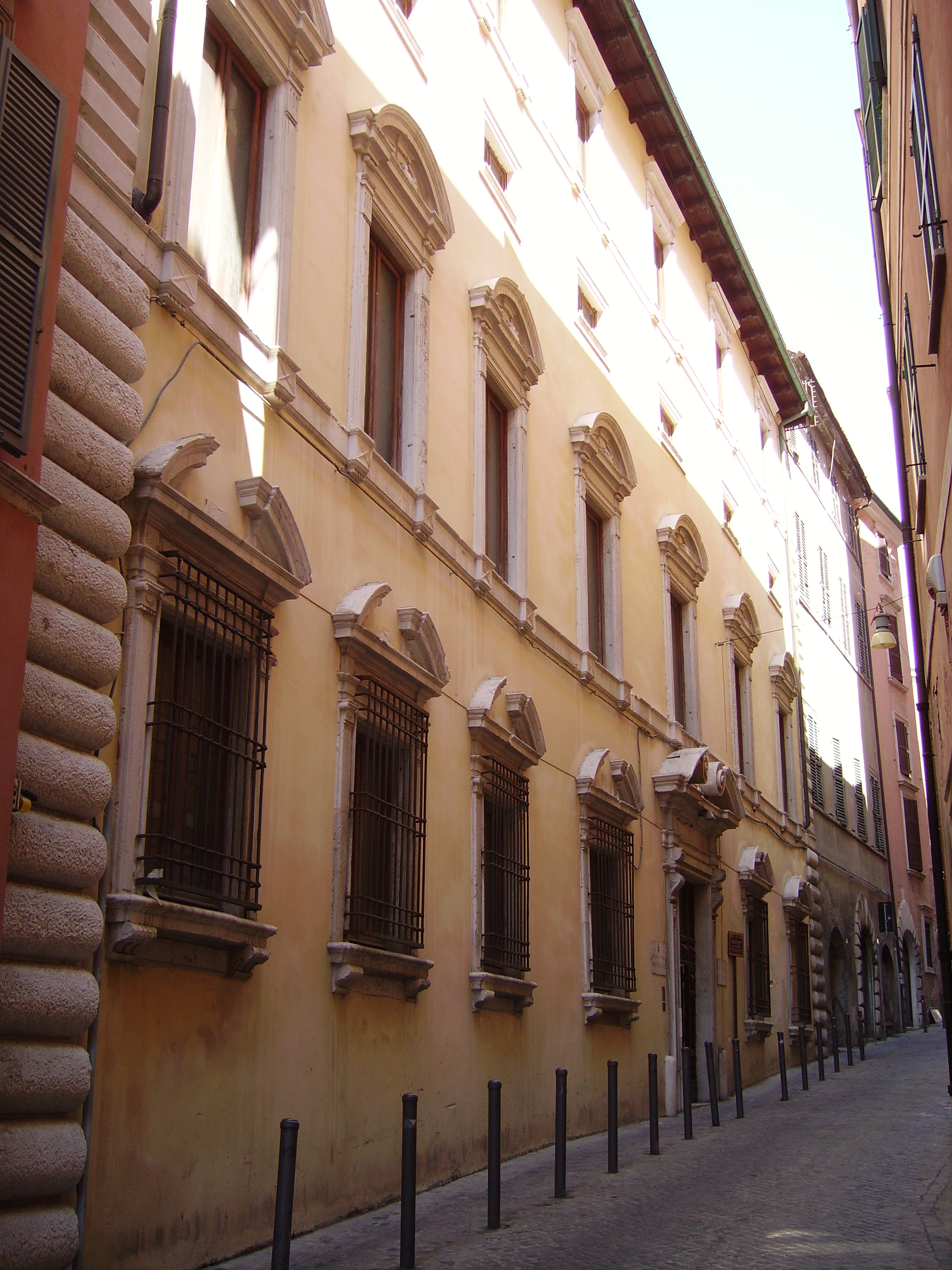 Palazzo Bosdari ad Ancona, ospita la pinacoteca civica "Francesco Podesti"